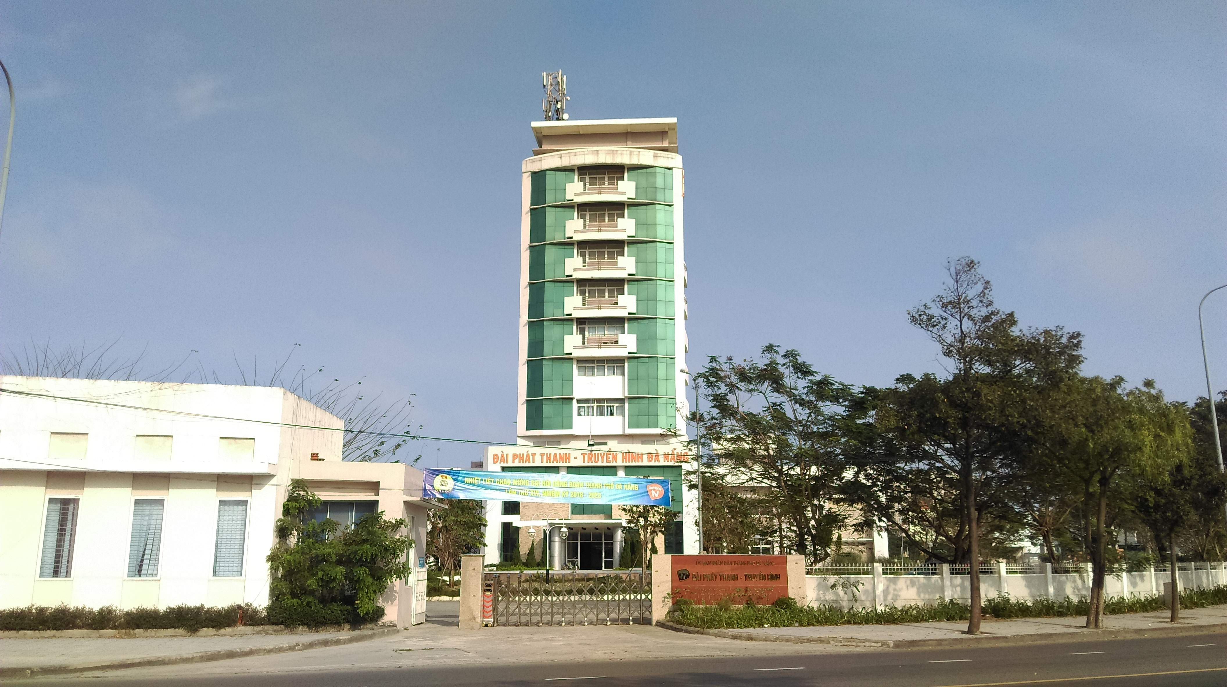 Đài Phát thanh Truyền hình Đà Nẵng